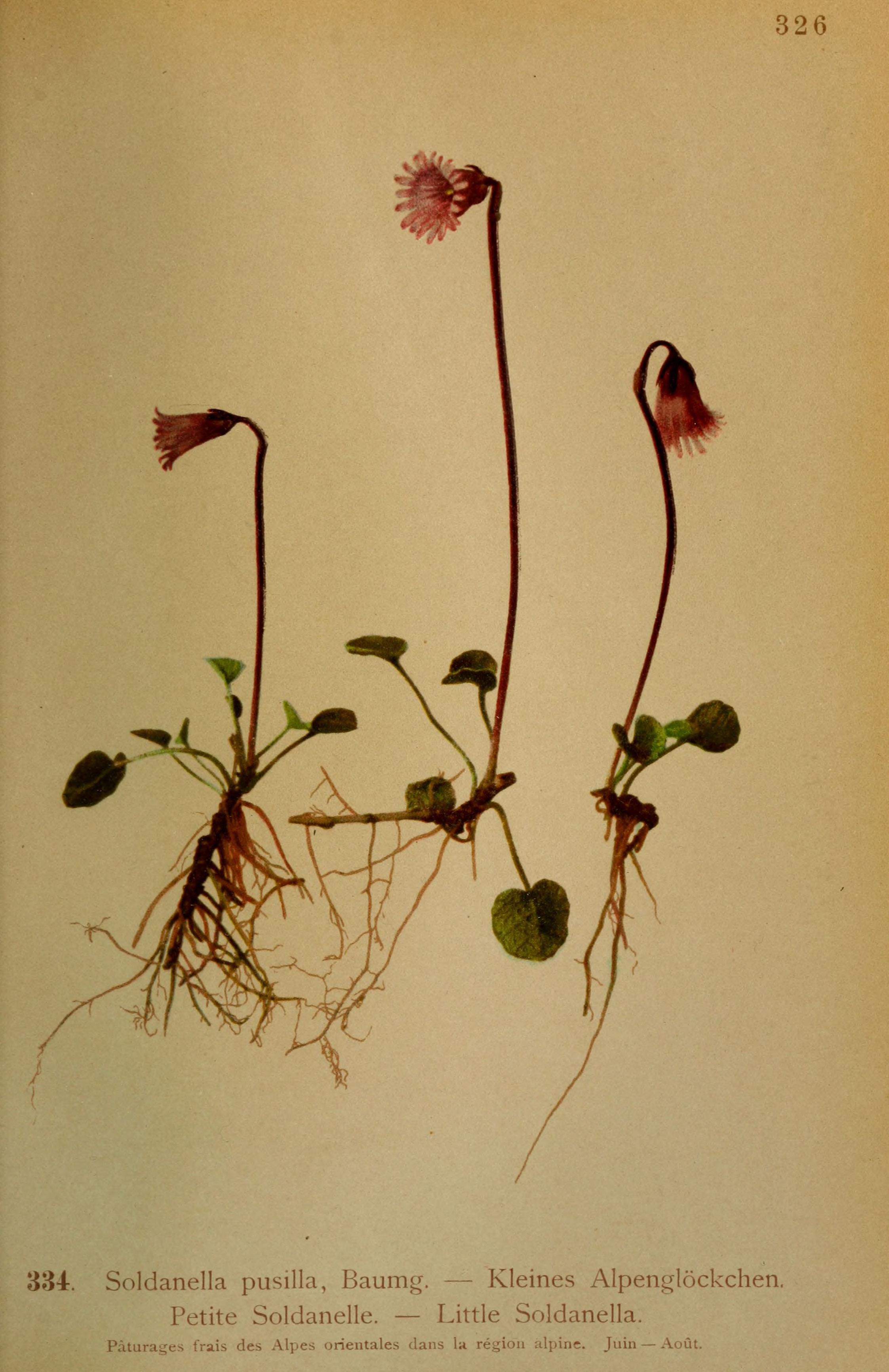 326 33-1:. Soldanella pusilla, Baumg. — Kleines Alpenglôckchen. Petite Soldanelle. — Little Soldanella. I aiuiugcs frais des Alpes orientales dans la région alpine. Juin — Août.